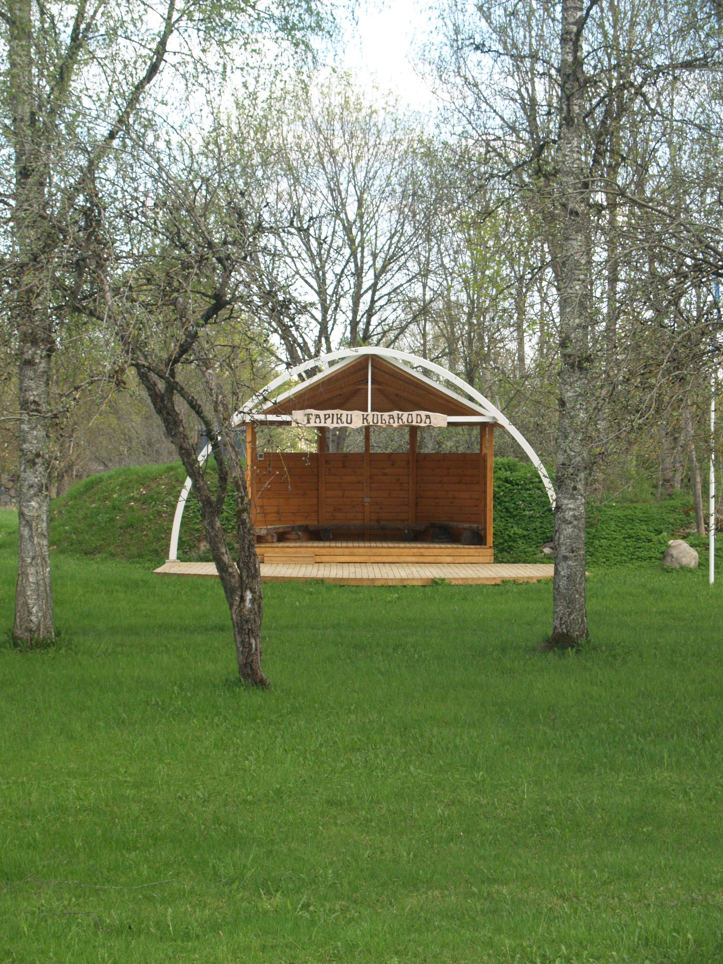 Tapiku laululava, Pajusi vallas